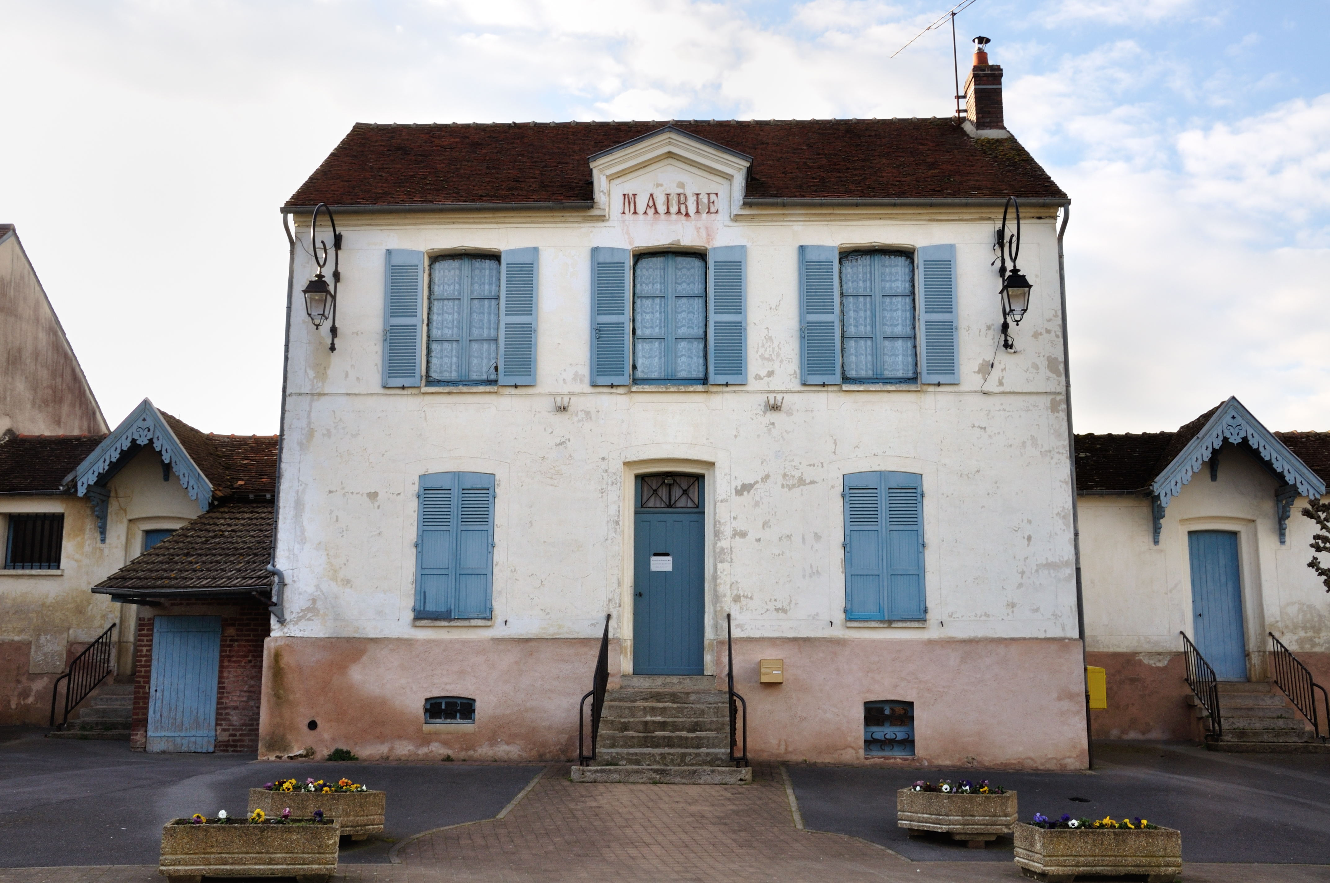 Mairie de Saint-Germain-sous-Doue. (Seine-et-Marne, région Île-de-France).